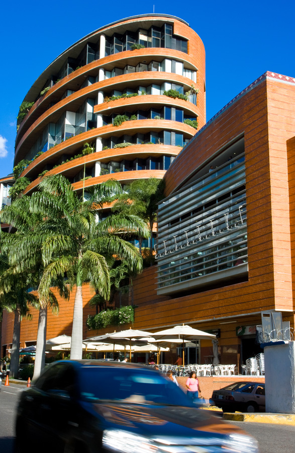 Fachada de Centro San Ignacio